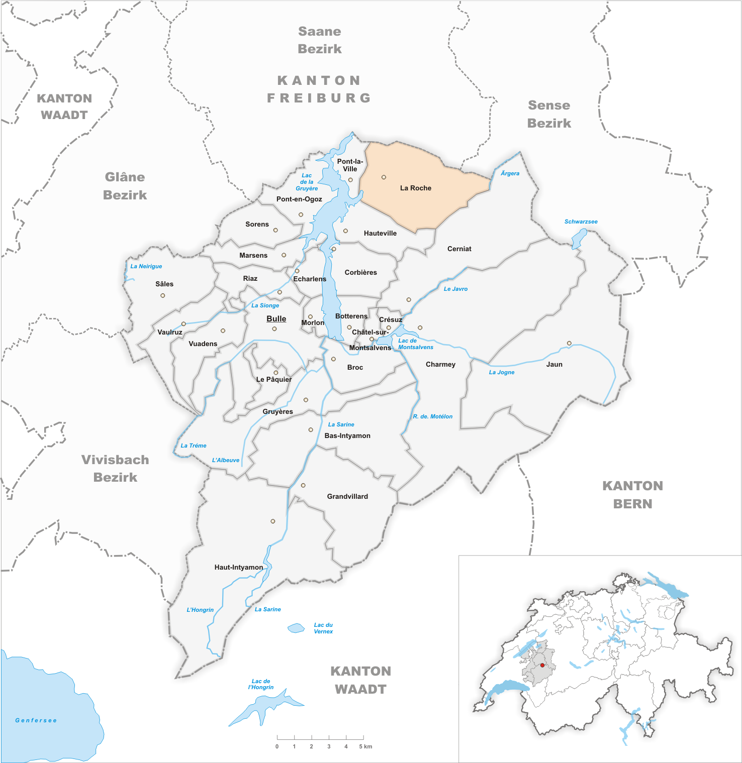 Municipality La Roche